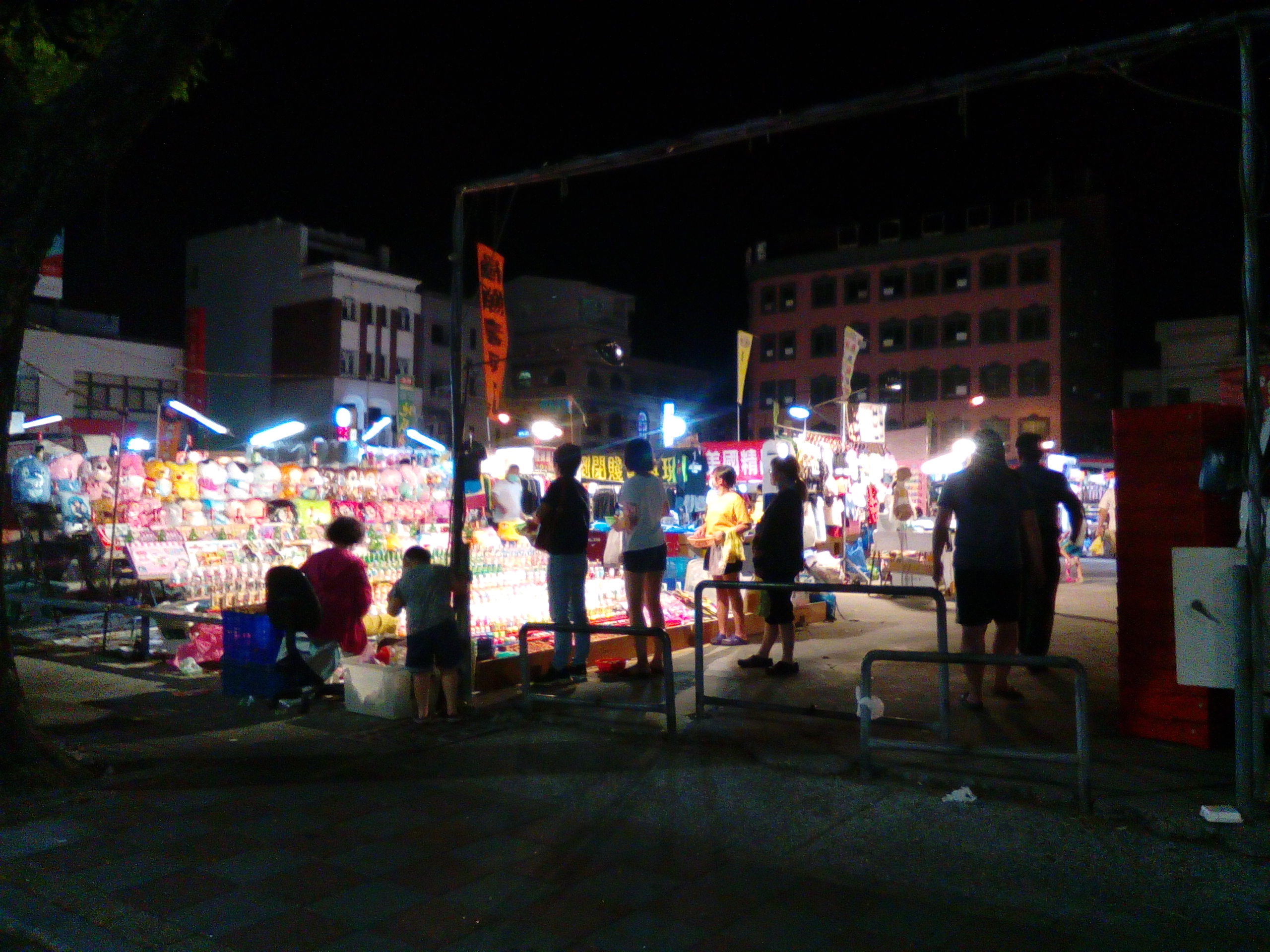 岡山夜市 位於省道台一線旁 岡山火車站斜對面 週五晚間營業